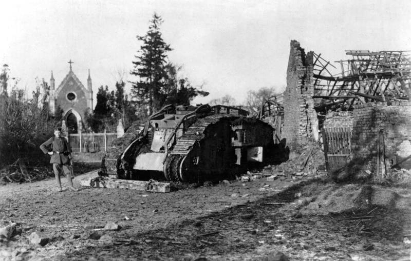 Westfront, bei Cambrai erbeuteter Panzer ADN-ZB-Archiv I. Weltkrieg 1914 - 1918: Von deutschen Truppen in der Schlacht bei Cambrai [November 1917] erbeuteter englischer Tank. 5326-17 [Scherl Bilderdienst]